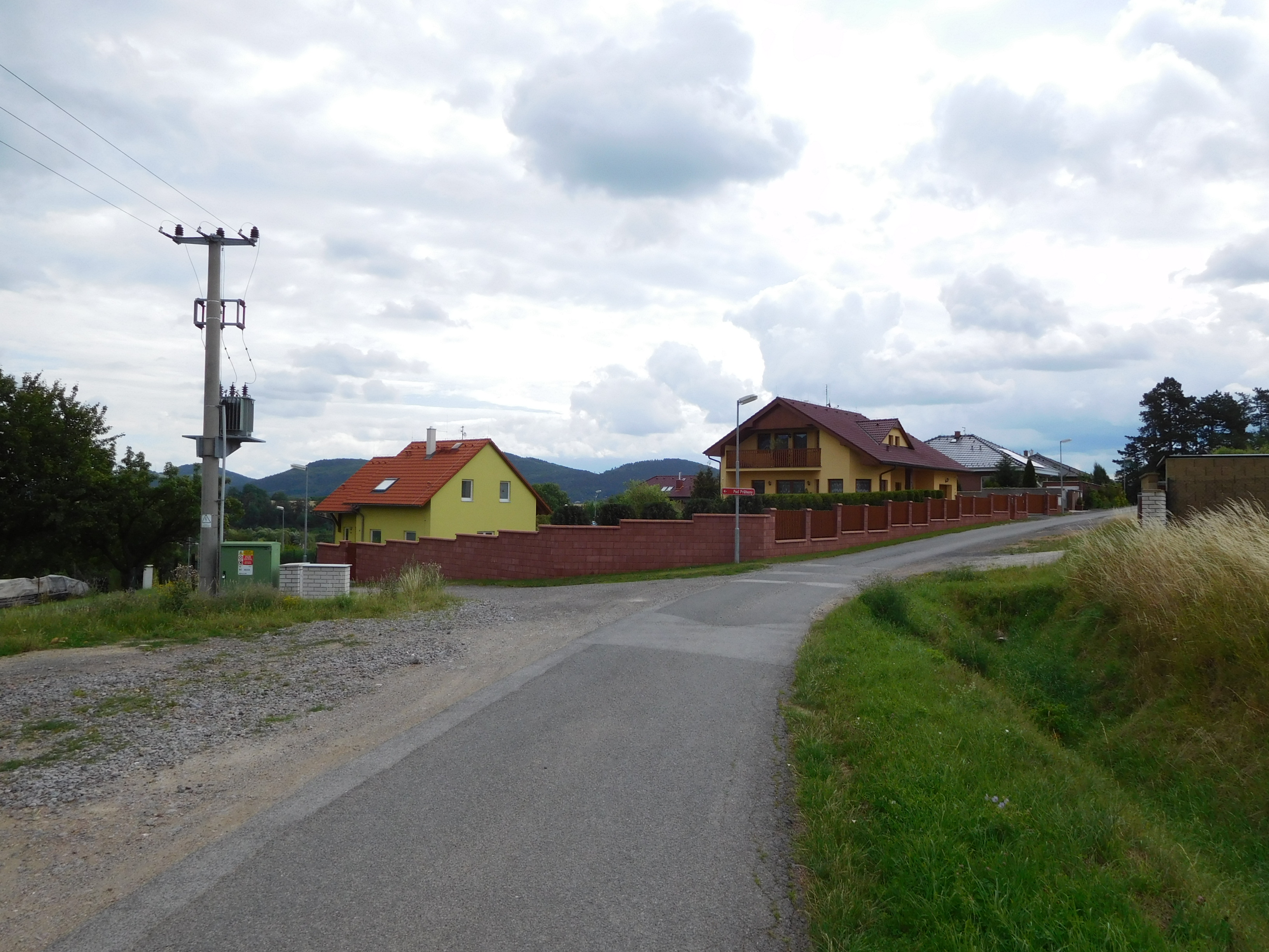 Bavoryně - Pod Průhony - č.p. 93 a 92